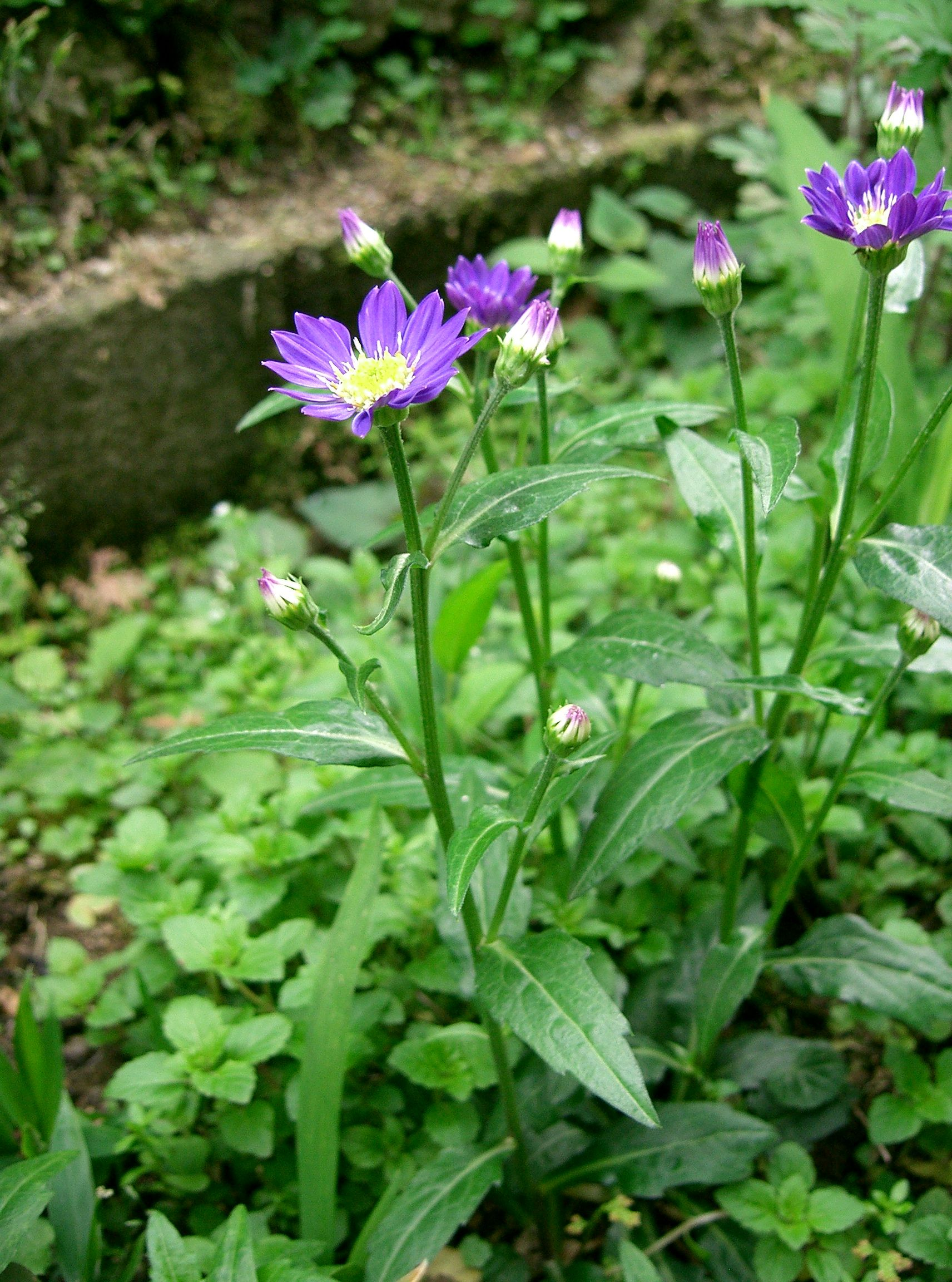 Gymnaster savatieri. Place: Osaka-fu, JAPAN